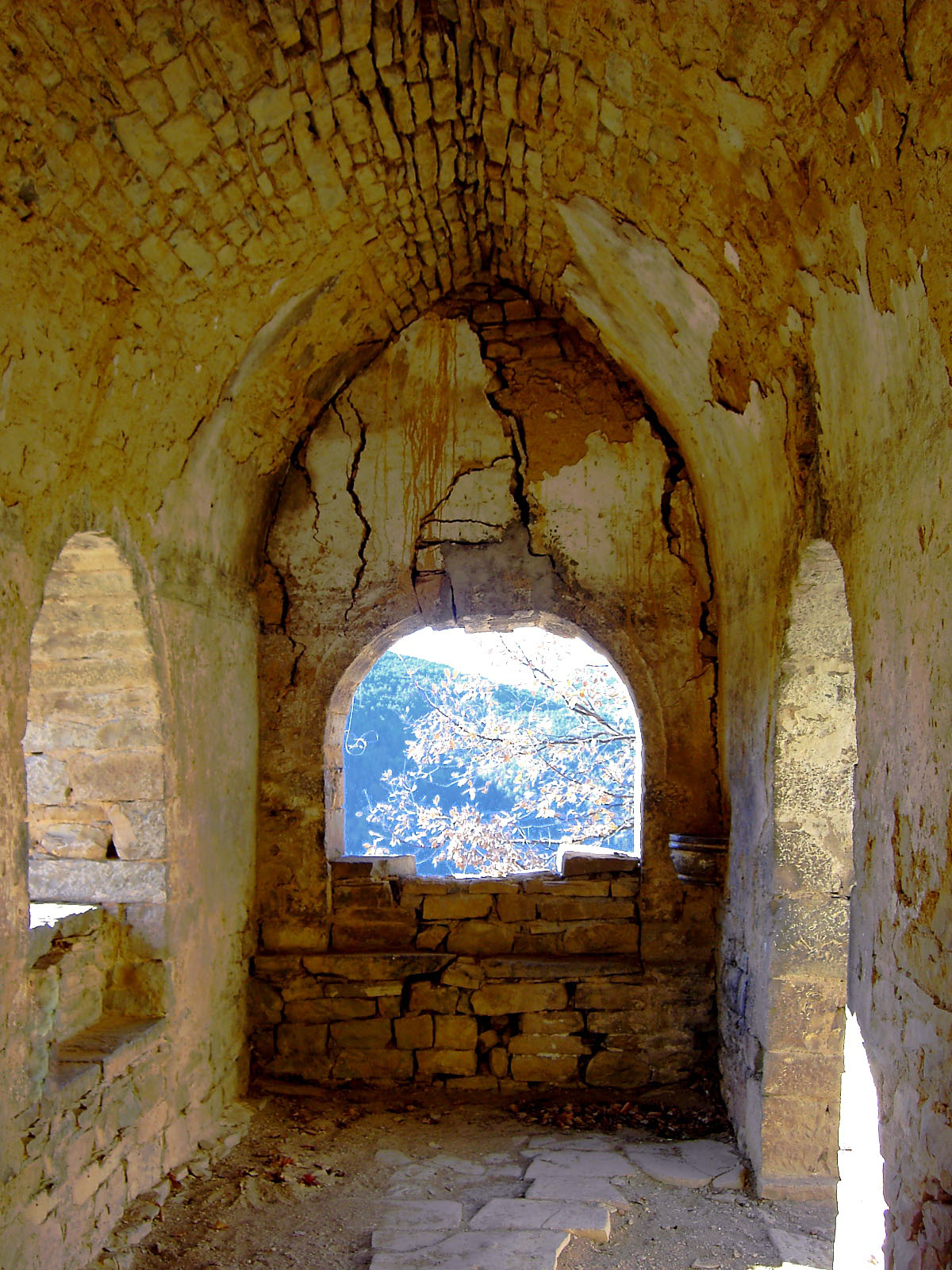 El interior del esconjurador o esconjuradera de Asín de Broto.